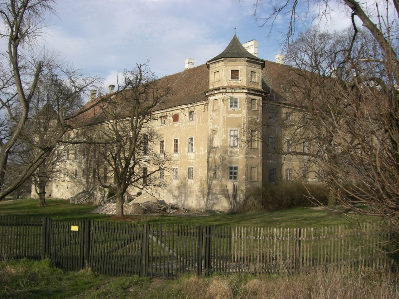 Schloss Petronell